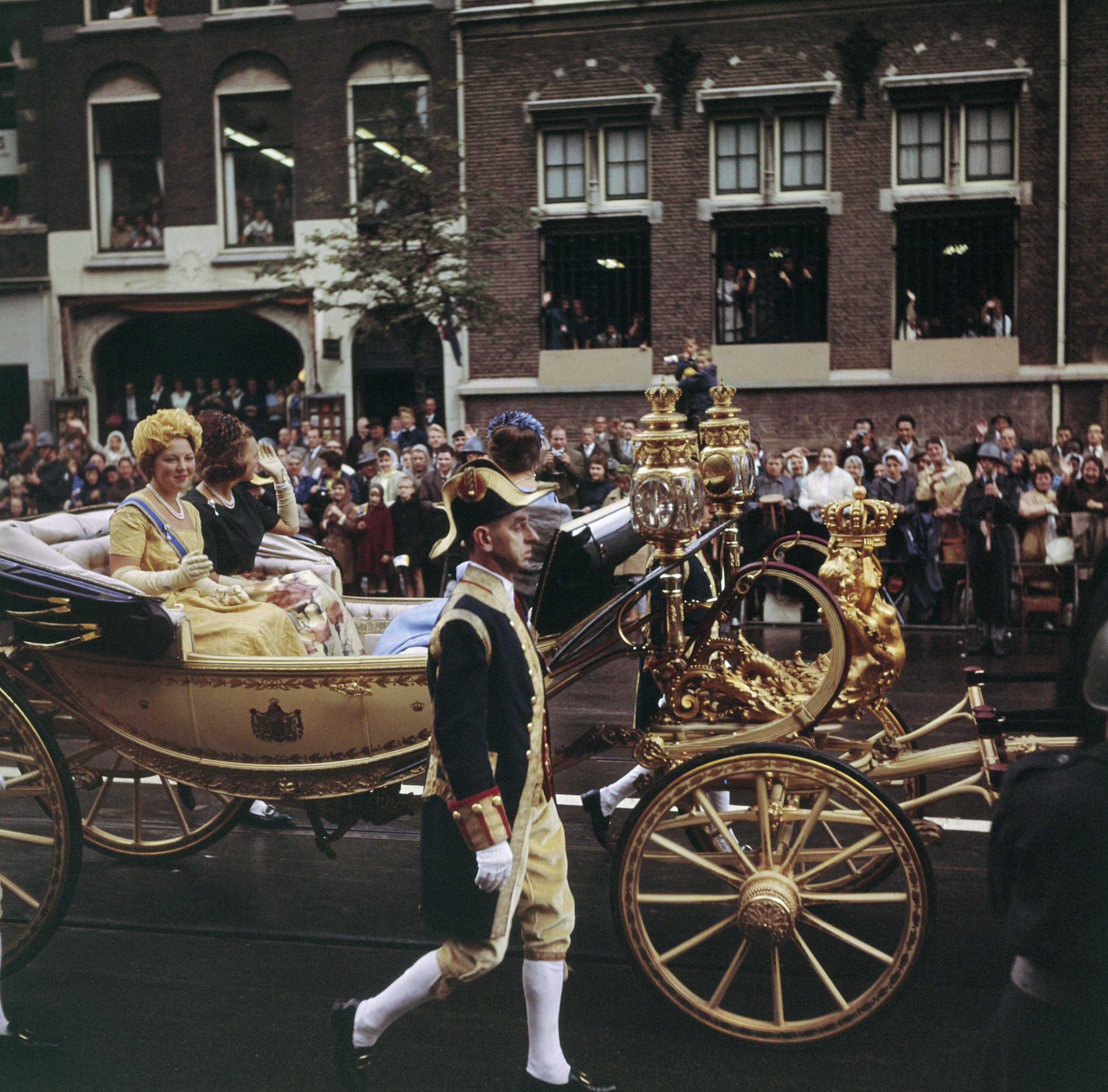 Collectie / Archief : Fotocollectie Anefo Reportage / Serie : [ onbekend ] Beschrijving : prinsjesdag Datum : september 1962 Locatie : Den Haag, Zuid-Holland Trefwoorden : prinsjesdag Fotograaf : Fotograaf Onbekend / Anefo Auteursrechthebbende : Nationaal Archief Materiaalsoort : Dia (kleur) Nummer archiefinventaris : bekijk toegang 2.24.01.07 Bestanddeelnummer : 254-7046